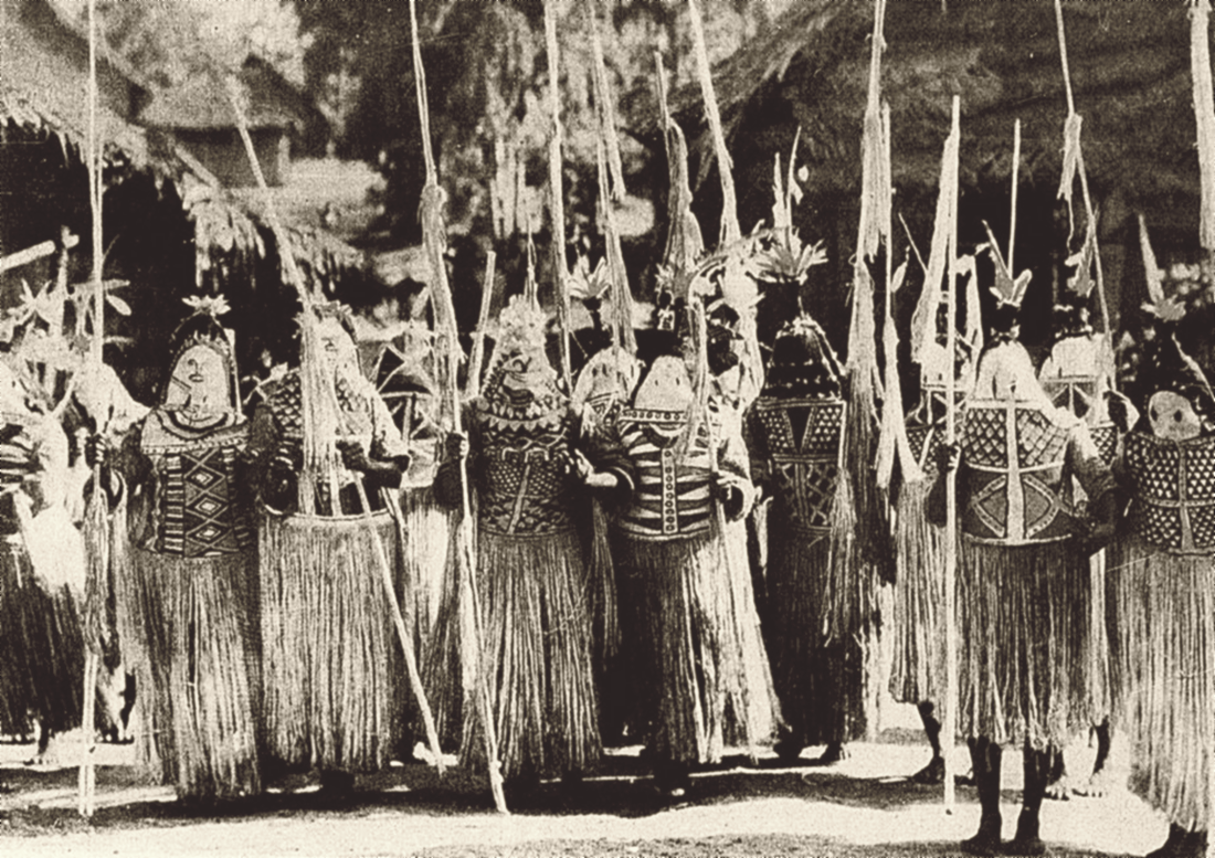 Legenda original: "Dança das máscaras. Índios uananas de Iutica. Alto rio Urupês, 1933. Indumentária muito artística feita exclusivamente de casca de madeira com lavores de pintura a cores." Fotografados em 1933 quando da demarcação das fronteiras entre Brasil e Colômbia.